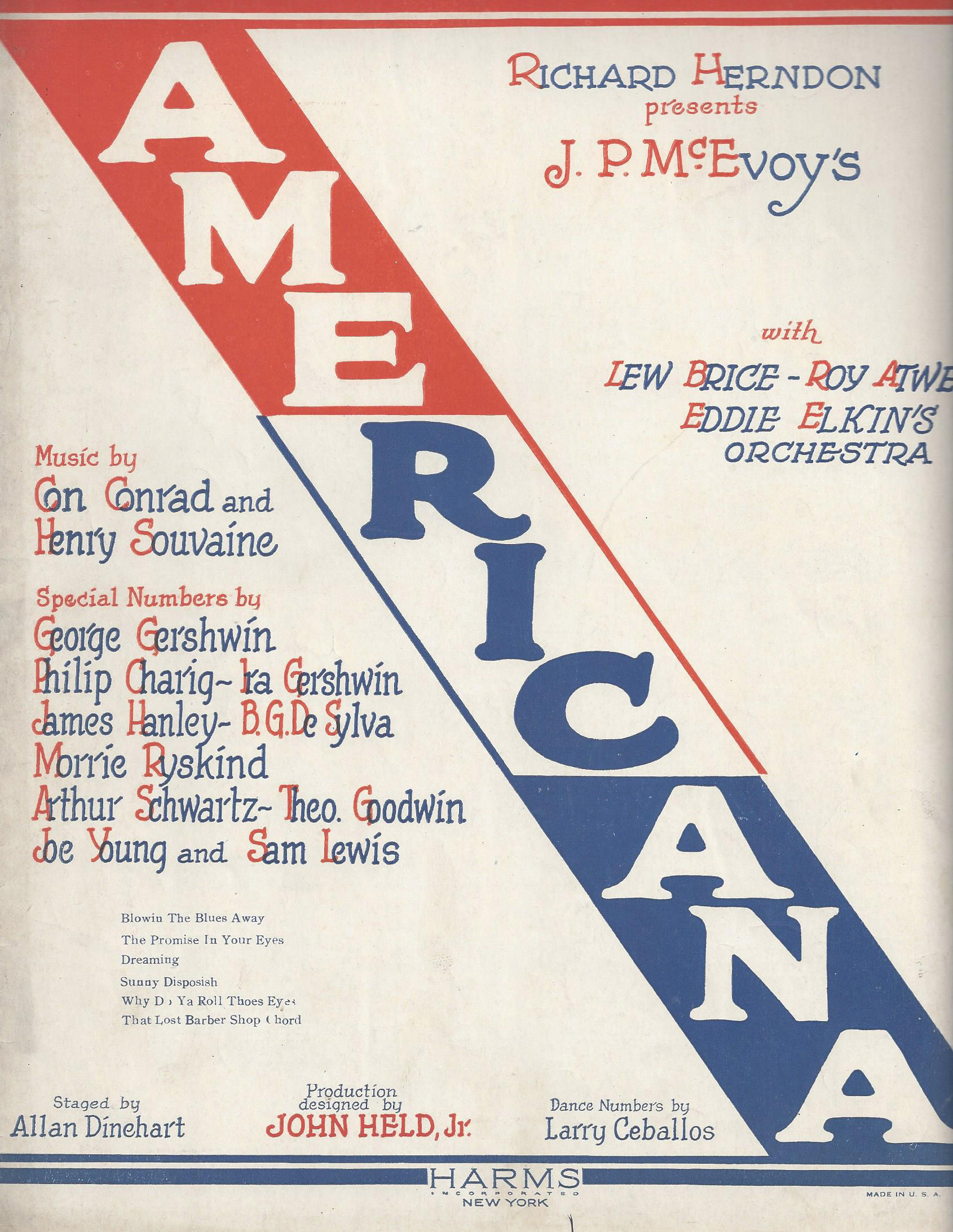 Americana (revue)